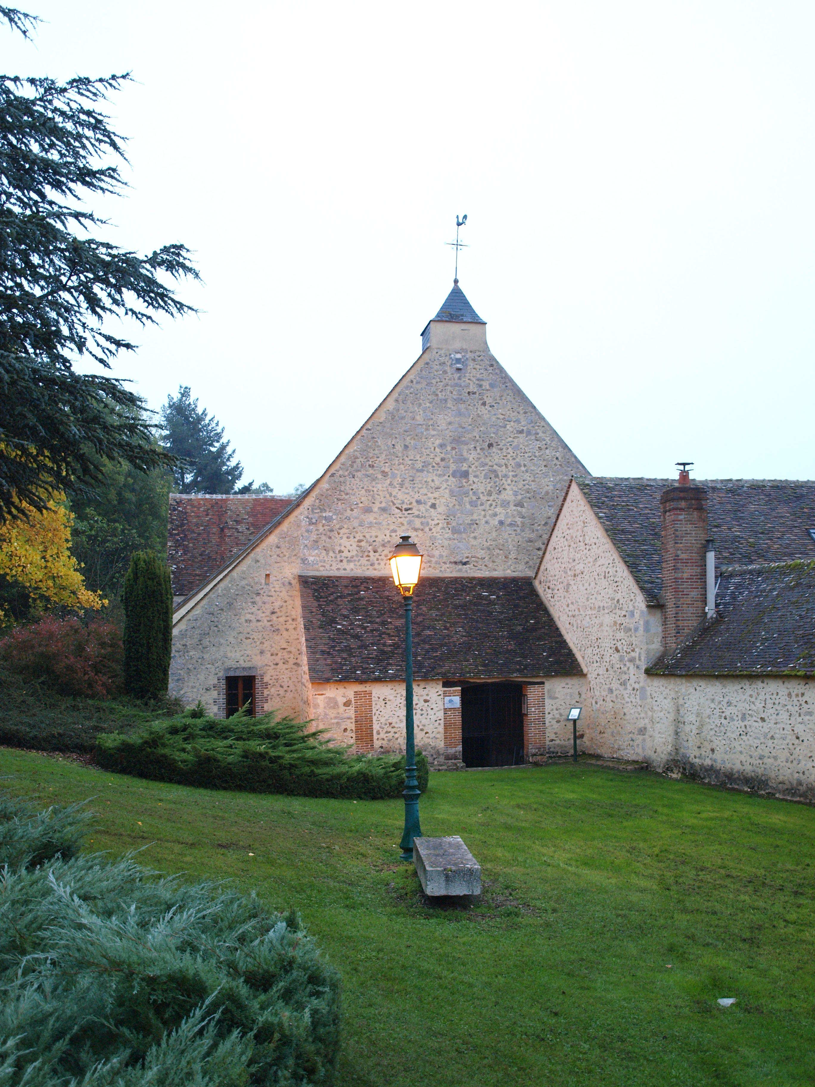 Chevry-sous-le-Bignon (Loiret, France) ; l'église